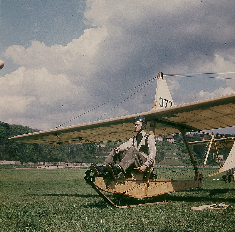 Original image description from the Deutsche Fotothek Dresden. GST-Segelfluggelände Dresden-Elbwiese, Schulgleiter SG 38 nach der Landung, Schrägansicht von vorn mit Gleitkufe und Pilot auf offenem Sitz